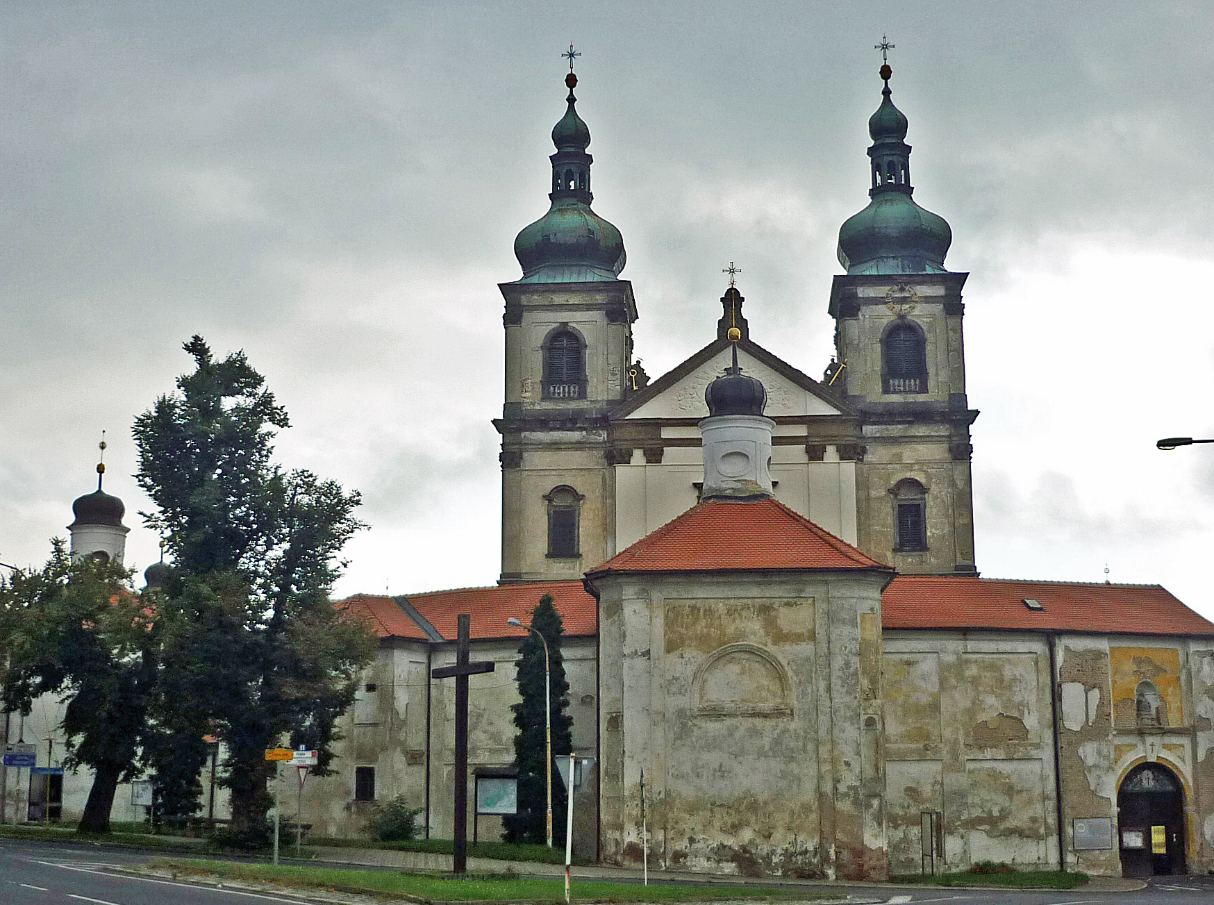 Wallfahrtskirche Schmerzen Mariens in Mariaschein (Bohosudov) in Nordböhmen